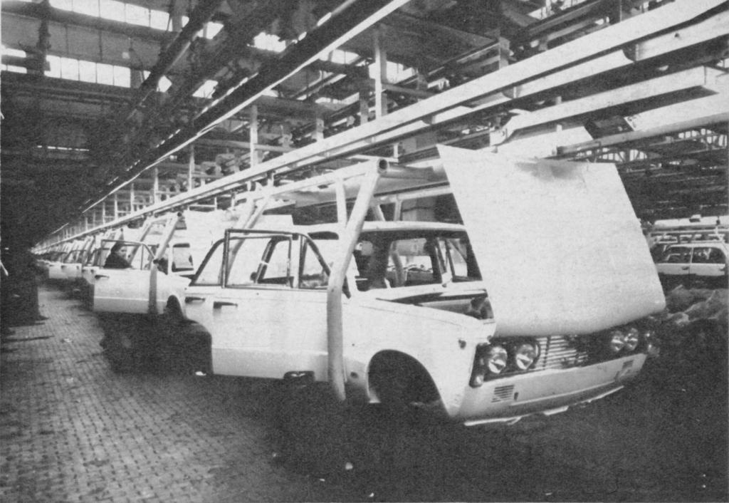 Montaż samochodów Polski FIAT 125p w hali Fabryki Samochodów Osobowych w Warszawie w latach 70. XX wieku